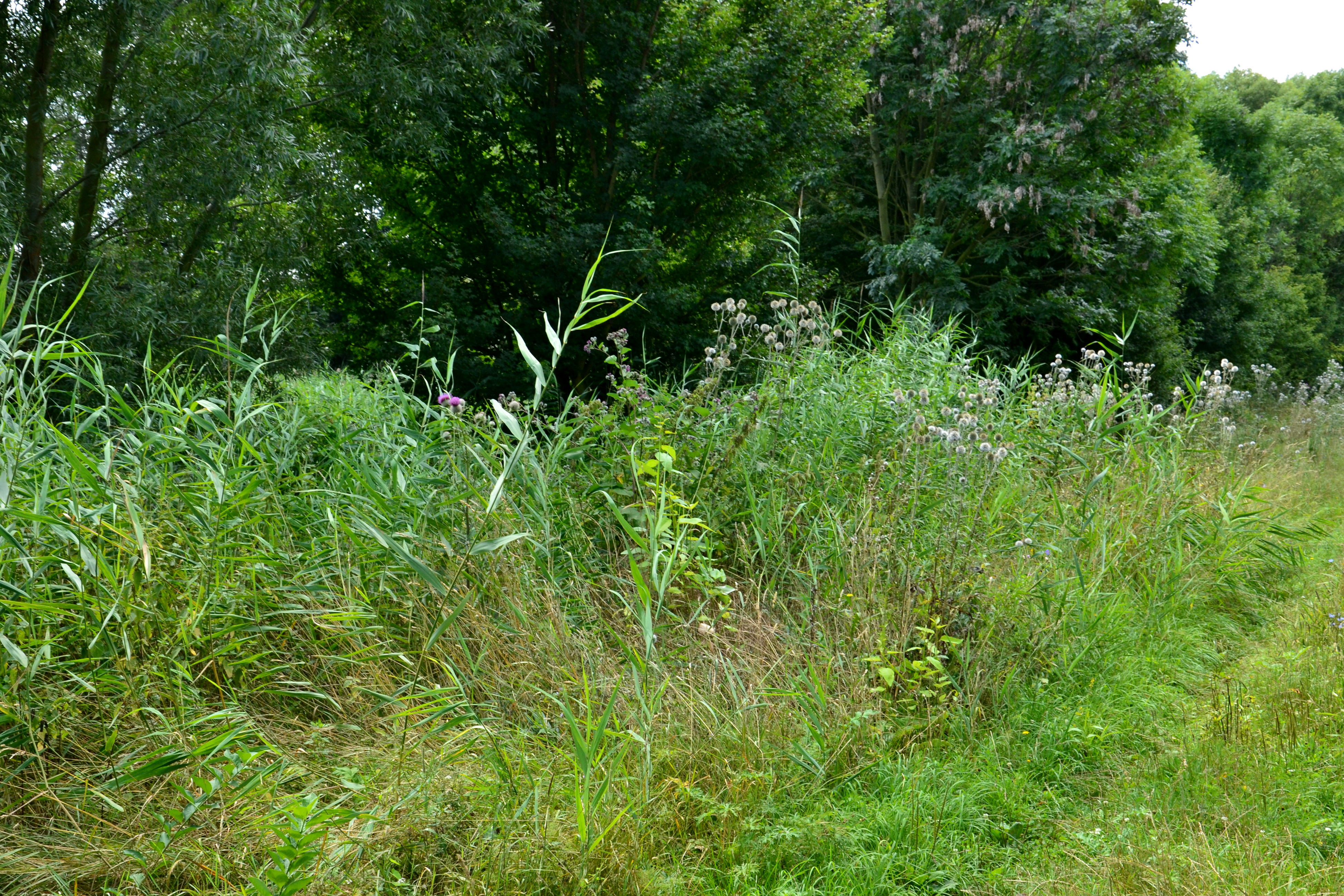 Rákosí podél hráze